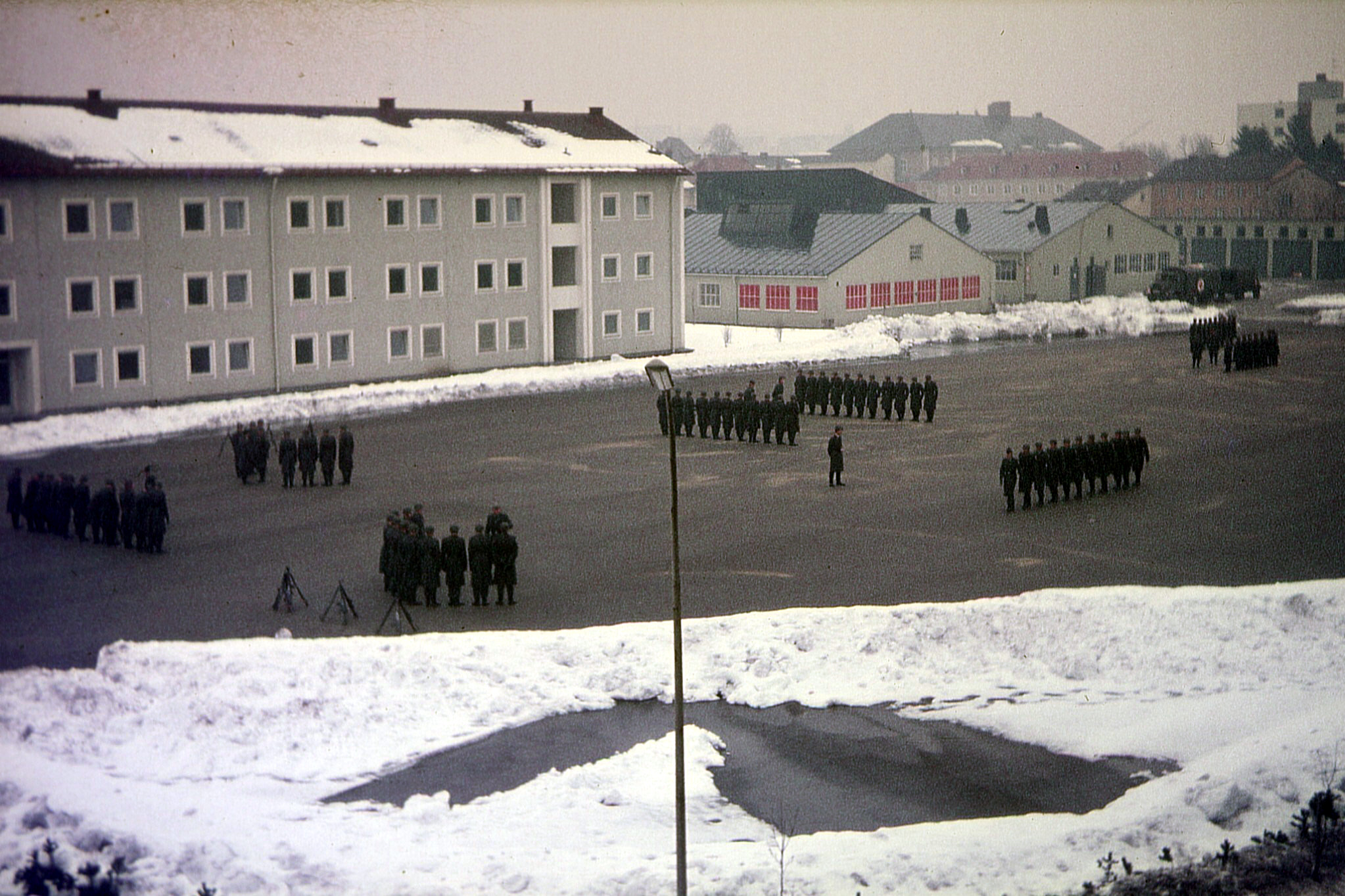 Fotografie des Bundeswehr-Lazaretts Kempten